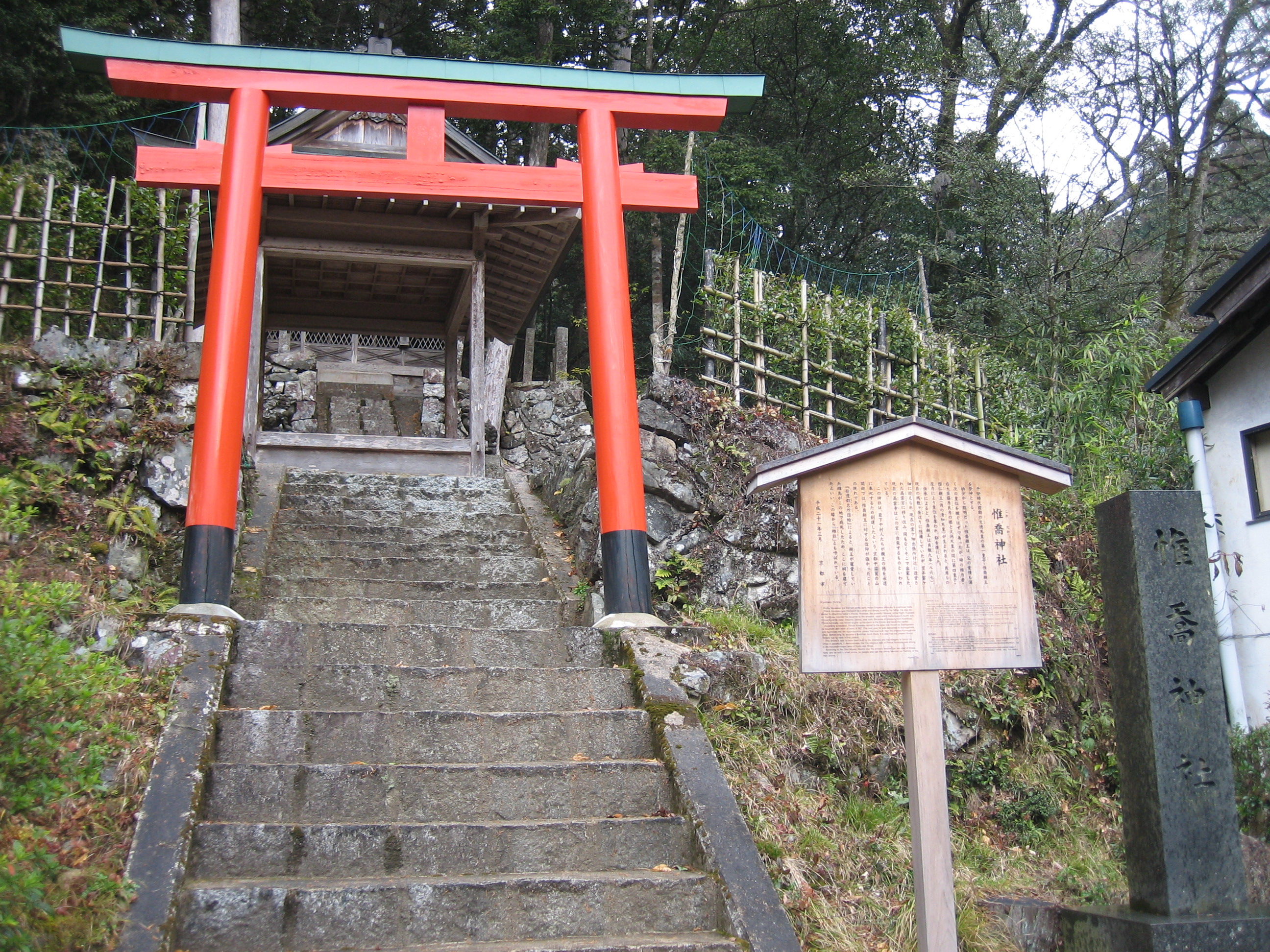 惟喬神社門前を撮影